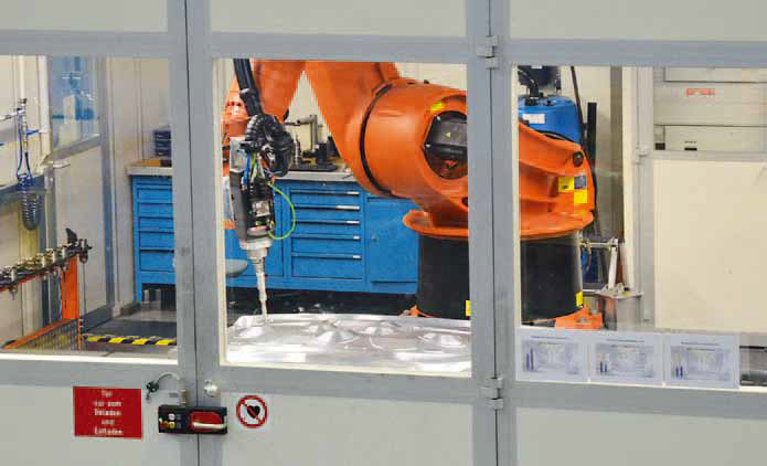 Roboterzelle eines deutschen Automobilisten